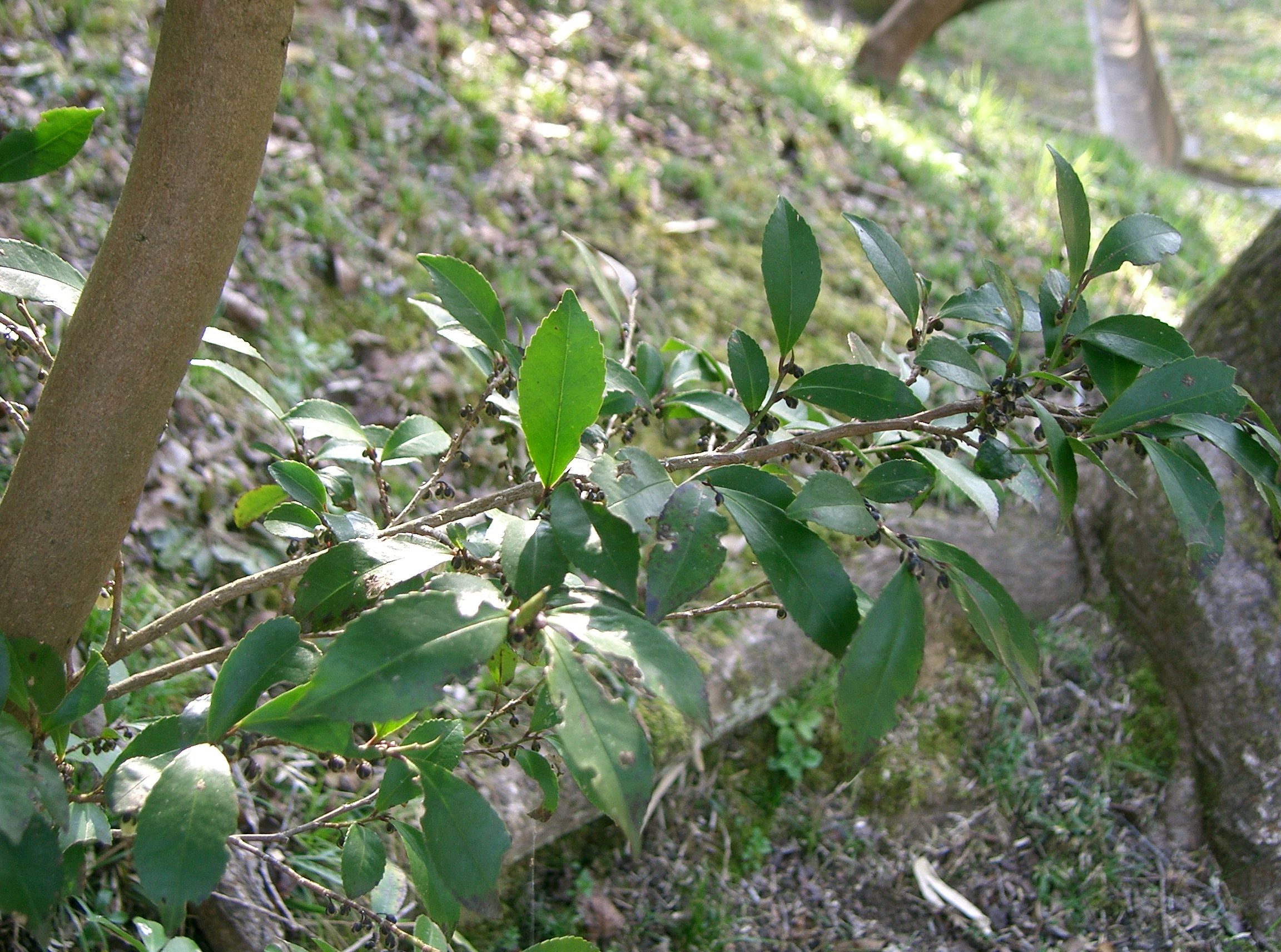 Eurya japonica